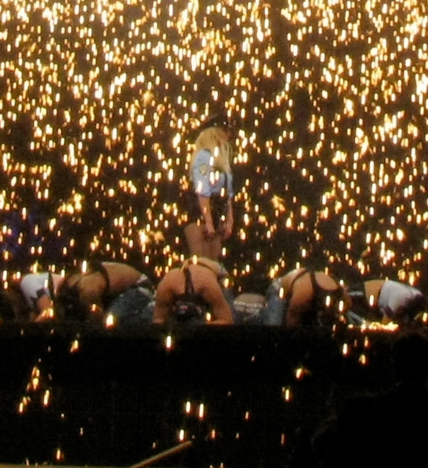 Britney Spears en el ultimo concierto de la primera de the circus starring: britney spears en montreal